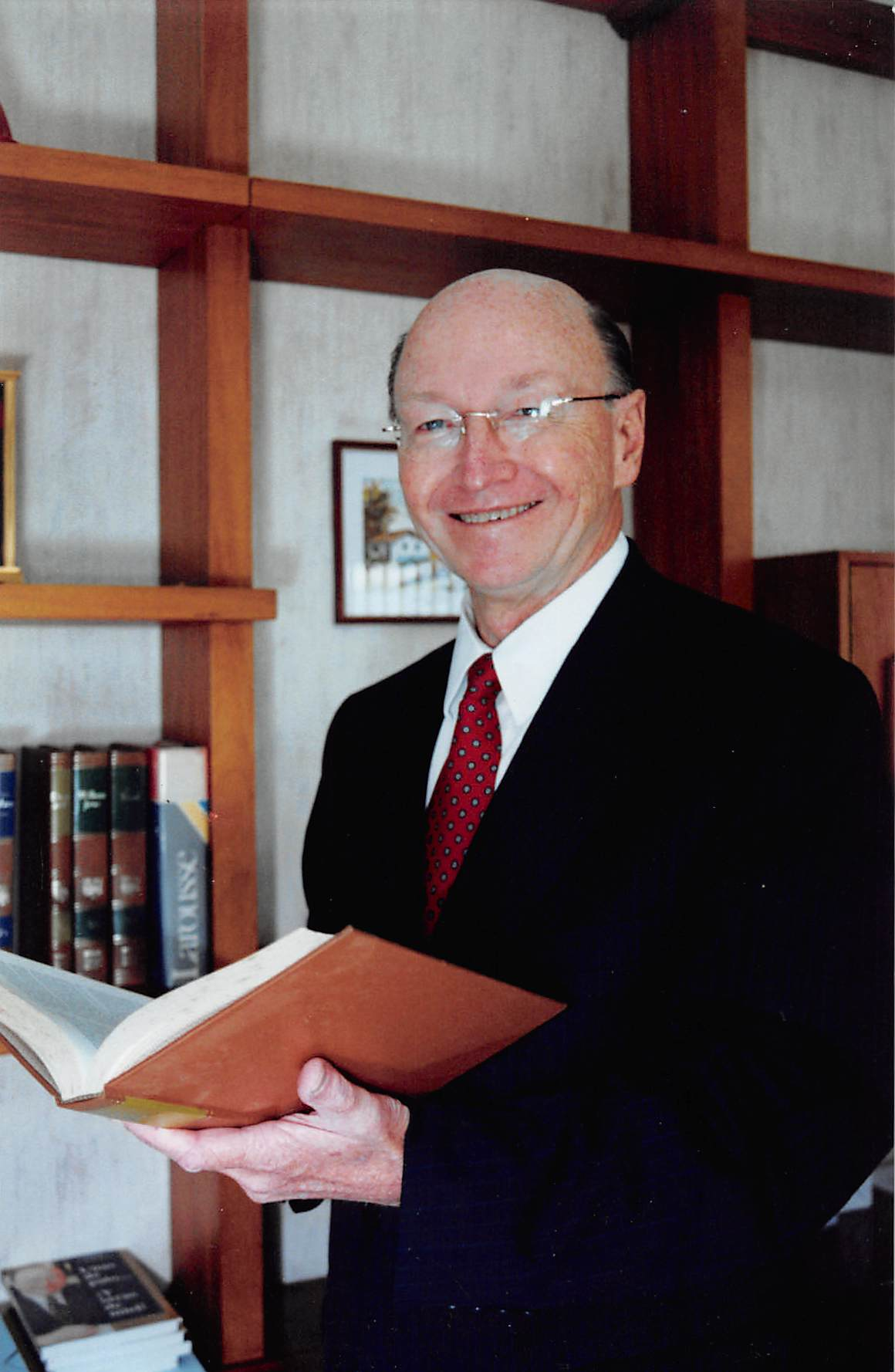 Germán Serrano Pinto